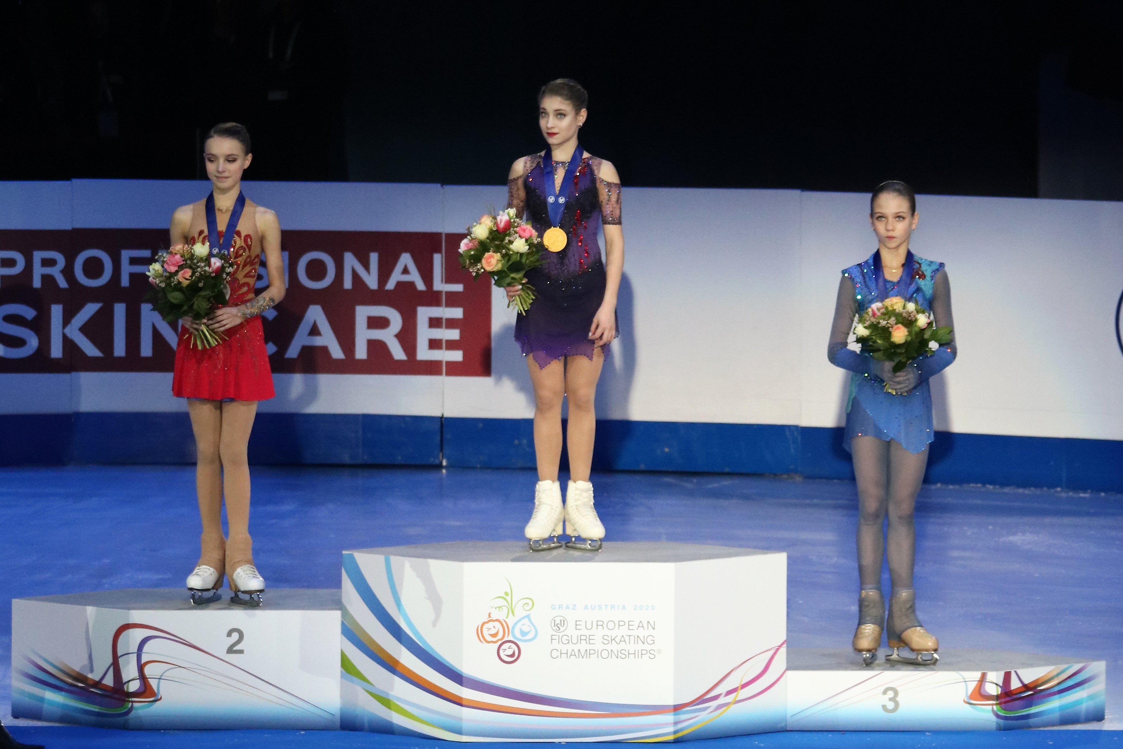 Церемония награждения в женском одиночном катании на чемпионате Европы по фигурному катанию 2020